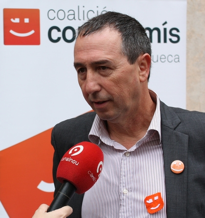 Joan Baldoví, ex-alcalde de Sueca i diputat al congrés espanyol pel BLOC/Compromís, en un acte de campanya, sent entrevistat per Canal 9